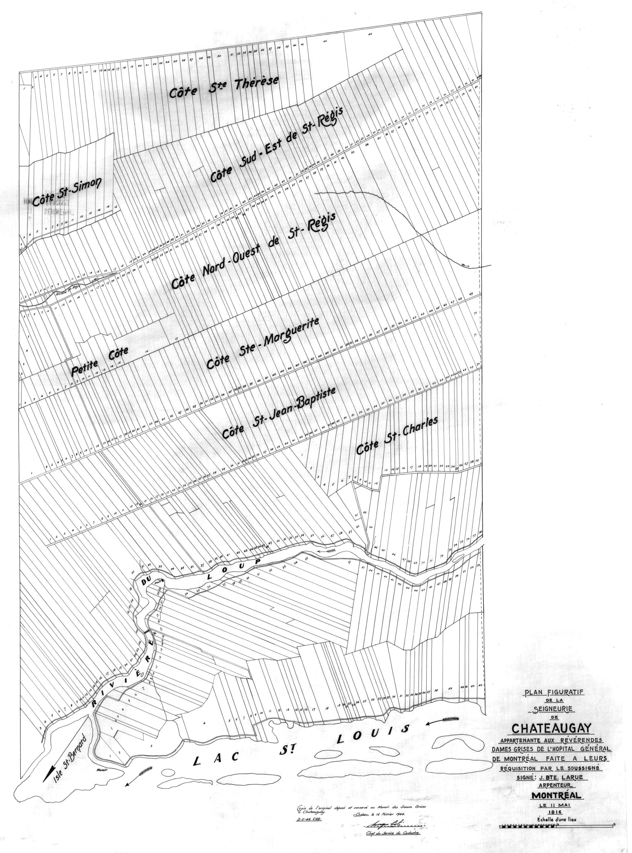 Plan de la seigneurie de Châteauguay appartenant aux Révérendes Dames Grises de l'Hôpital général de Montréal / Jean-Baptiste Larue . - 6 arpents : 1 po . - Copié le 16 février 1944, original créé le 11 mai 1816 - 1 plan(s) ; 159 x 110 cm